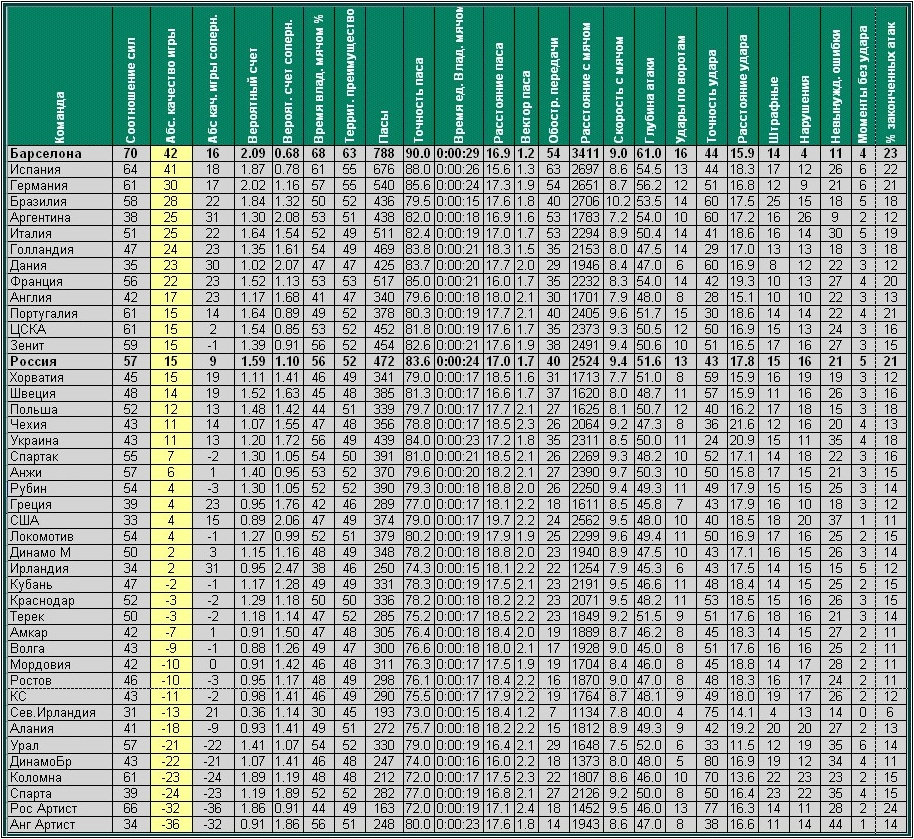 Выборка командной статистики из футбольной базы компании CraftSoft (результы Евро2012, исторические матчи, матчи команд разного уровня)